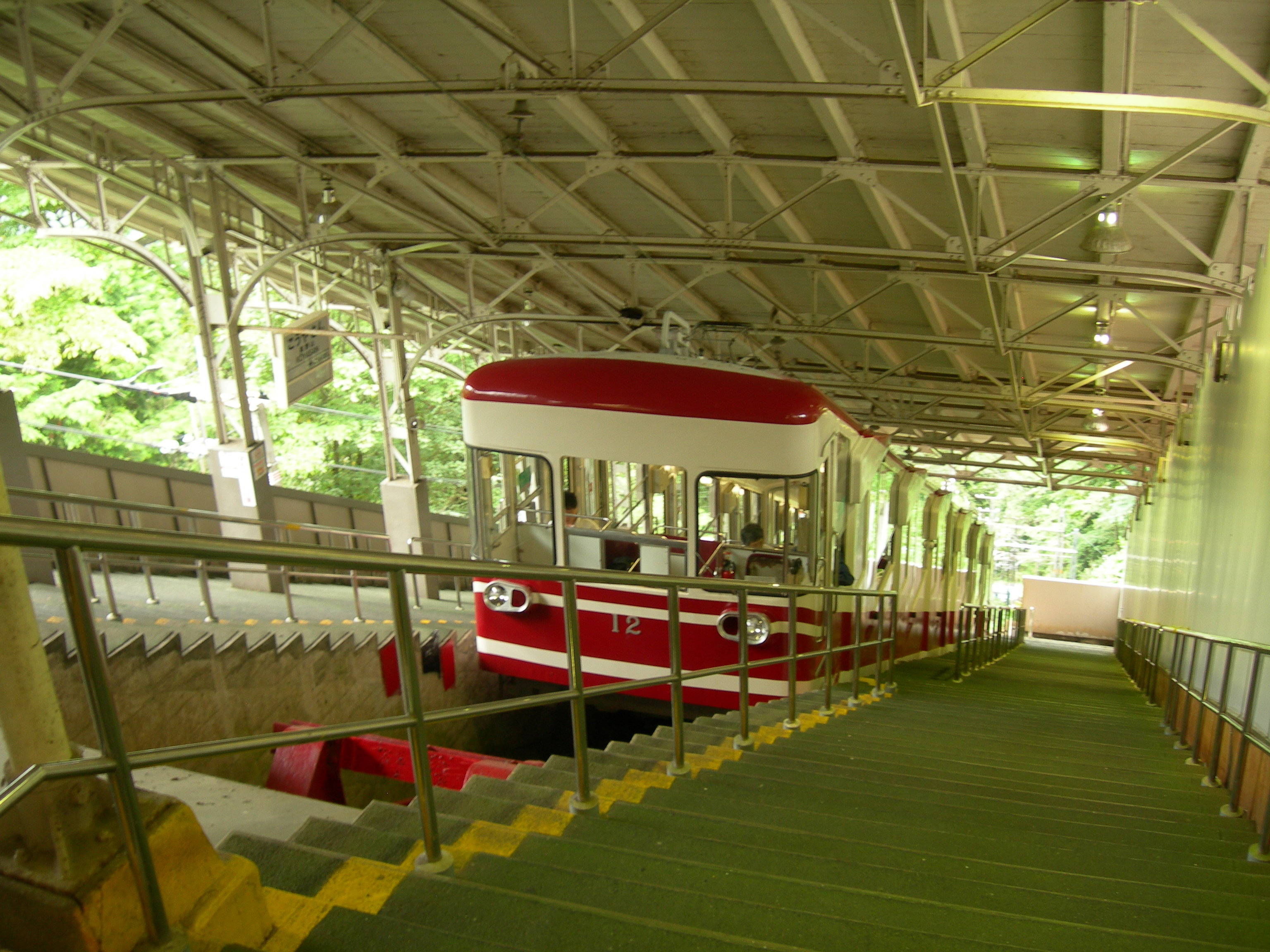 高野山駅 (和歌山県)プラットホーム